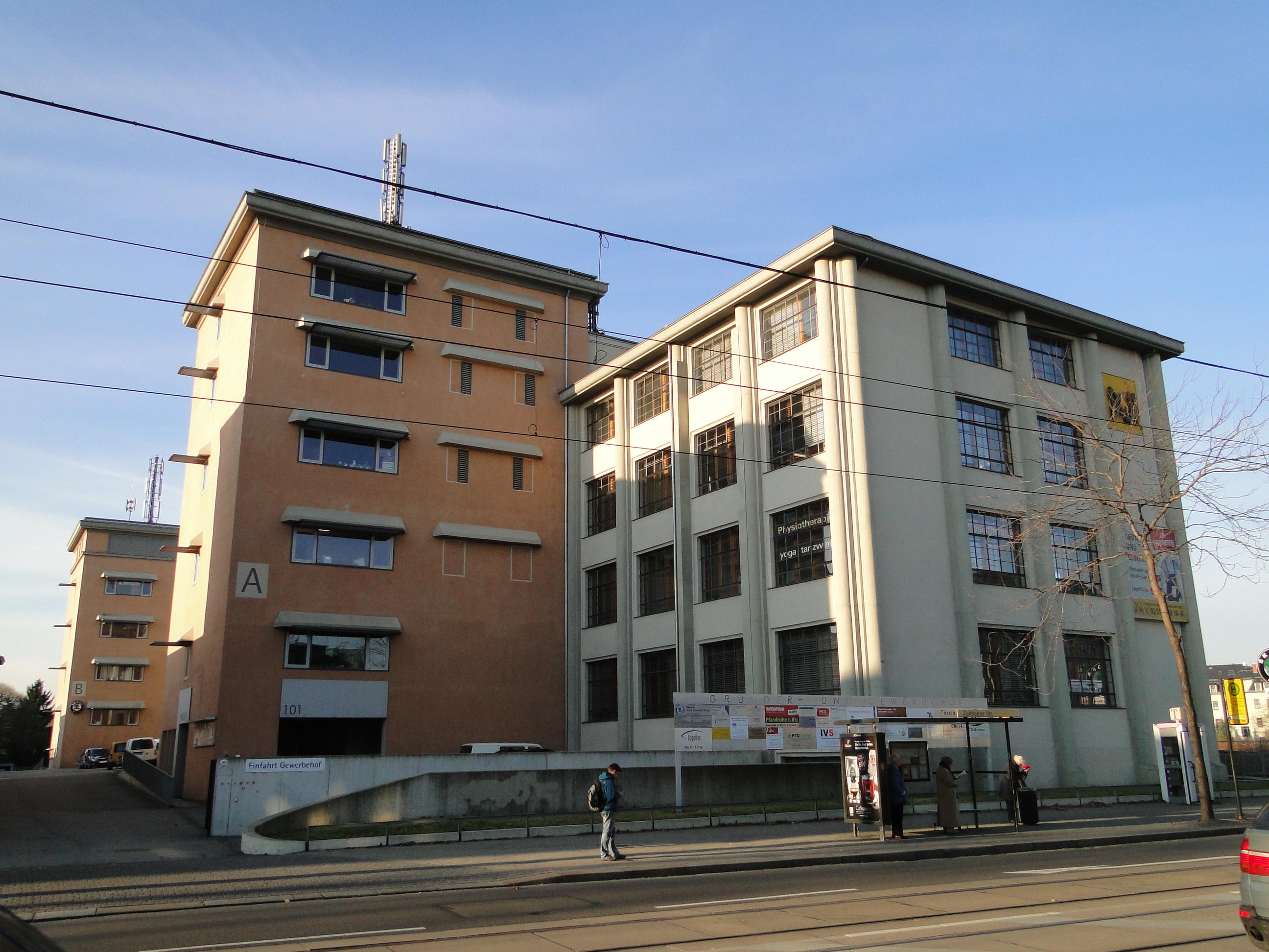 Großenhainer Straße 101 Dresden